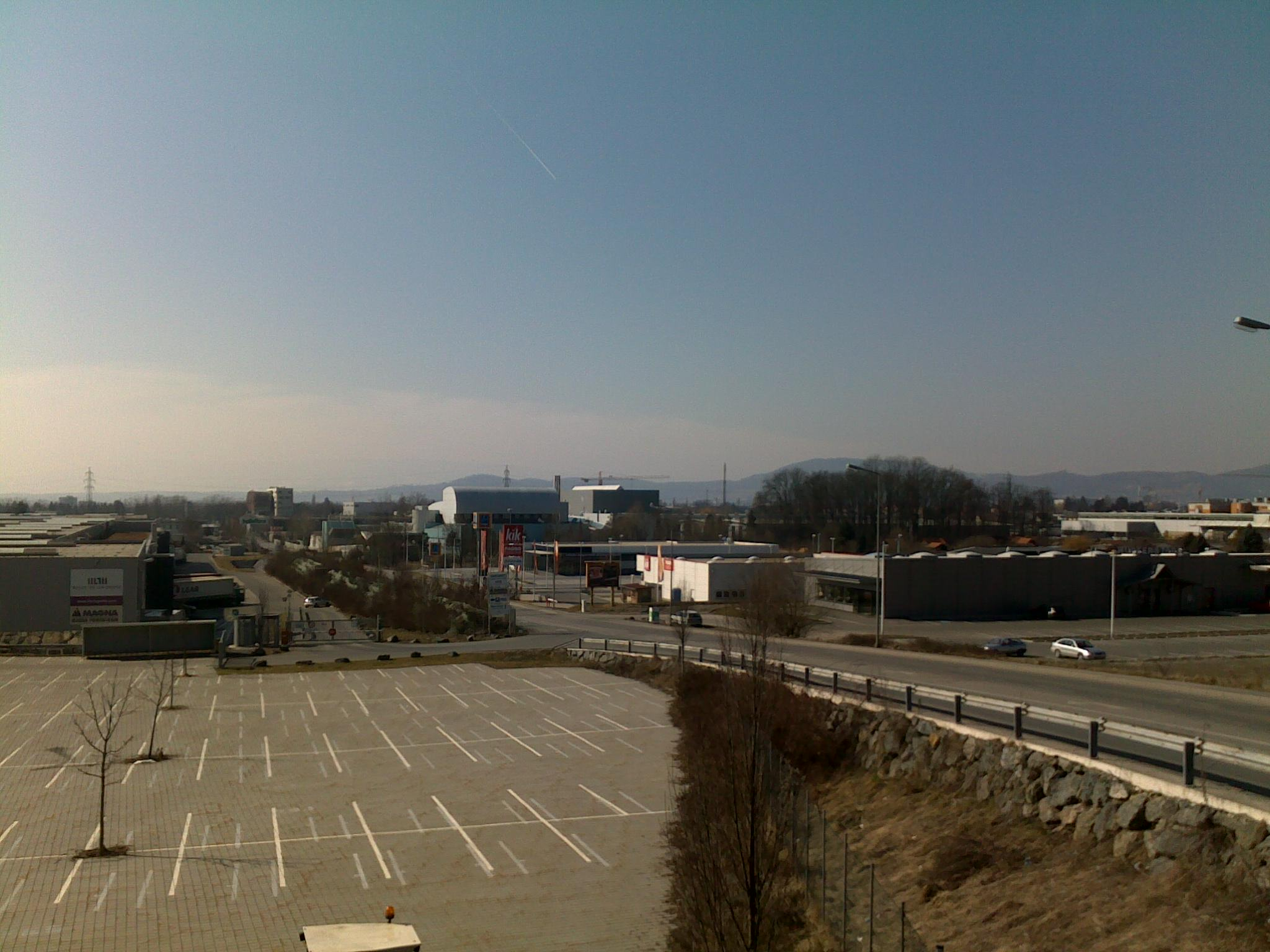 Der Industriepark / das Center-Ost in Graz-St. Peter